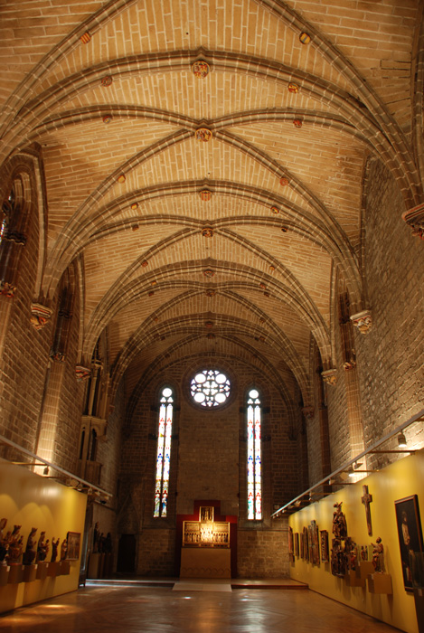 Refectorio de la catedral de Pamplona y parte del Museo Catedralicio